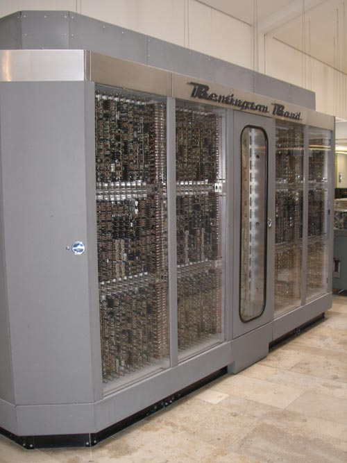 Rechenanlage UNIVAC I Factronic, Remington Rand Inc., ausgestellt im Deutschen Museum in München. Im Sommer 1956 wurde dieser Univac-Rechner Nr. 35 zerlegt und mit Konsole, Drucker und Bandlaufwerken in zwei Transportflugzeuge geladen. Von der Ostküste der USA ging es nach Frankfurt am Main. Der Röhrenrechner stand im Europäischen Rechenzentrum, das räumlich zum Frankfurter Battelle-Institut gehörte. Hier setzten sechs fleißige Techniker die 400 Zentner schwere Anlage wieder zusammen. Am 19. Oktober 1956 konnte der Leiter des Europäischen Rechenzentrums, der Deutschamerikaner Carl Hammer, den Computer in Dienst stellen. Insgesamt wurden 46 Stück produziert. Im Februar 1960, nach nur dreijähriger Laufzeit, wurde die Anlage als technisch veraltet abgeschaltet.